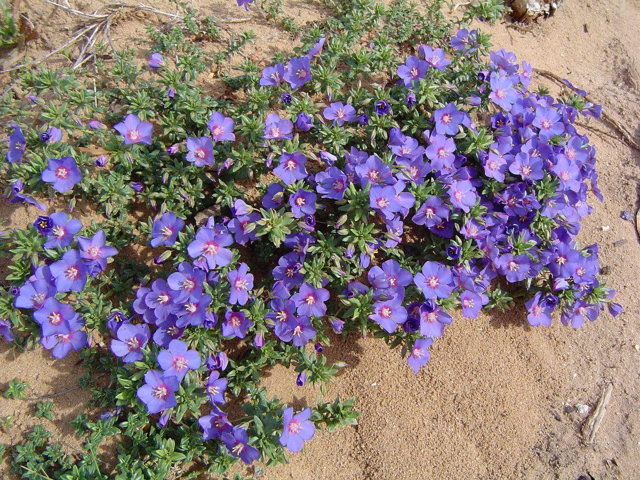 Lysimachia monelli subsp. linifolia (sin. Anagallis linifolia). Foto tomada en la costa de Cádiz (España)